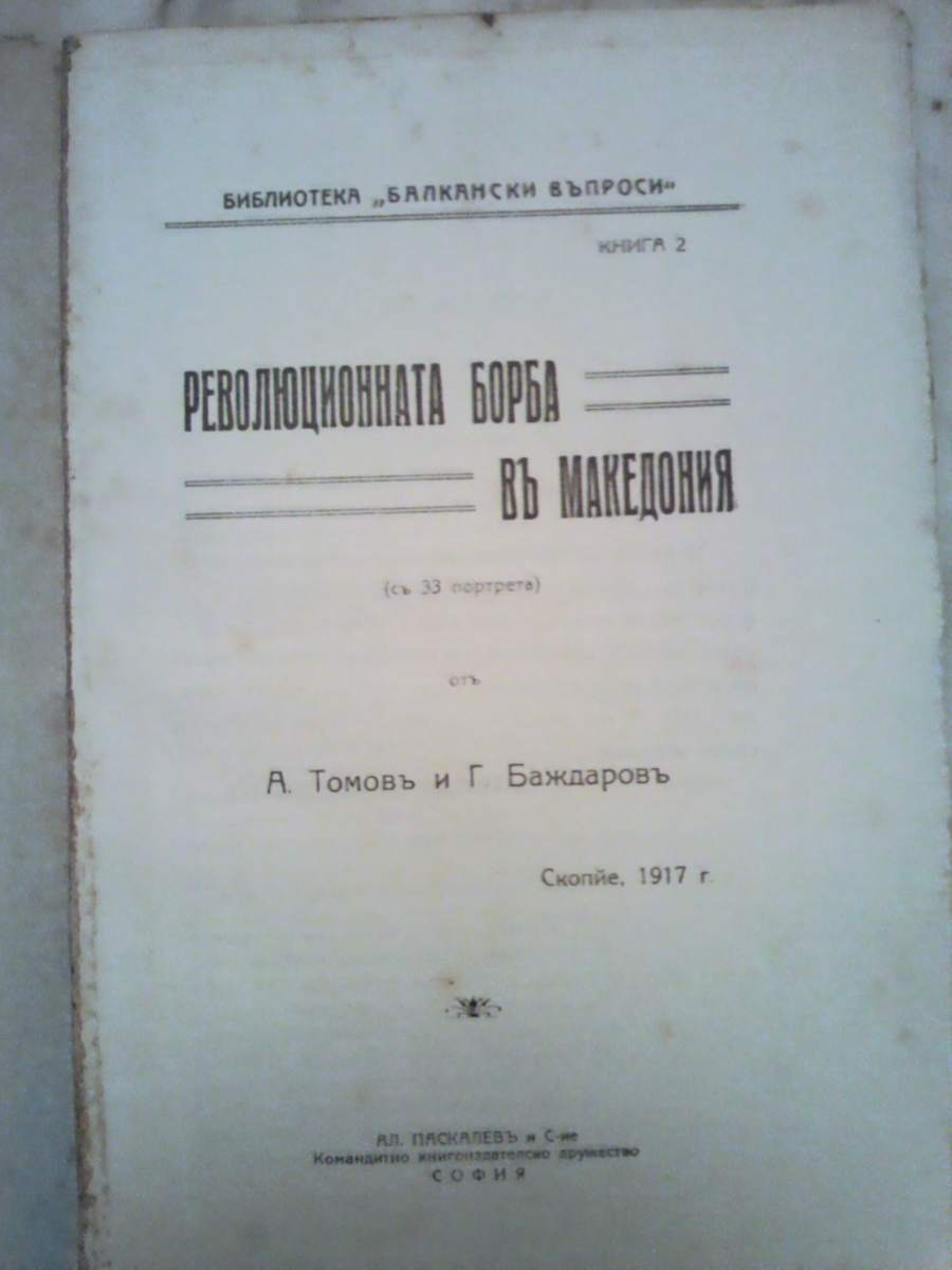 Революционната борба в Македония